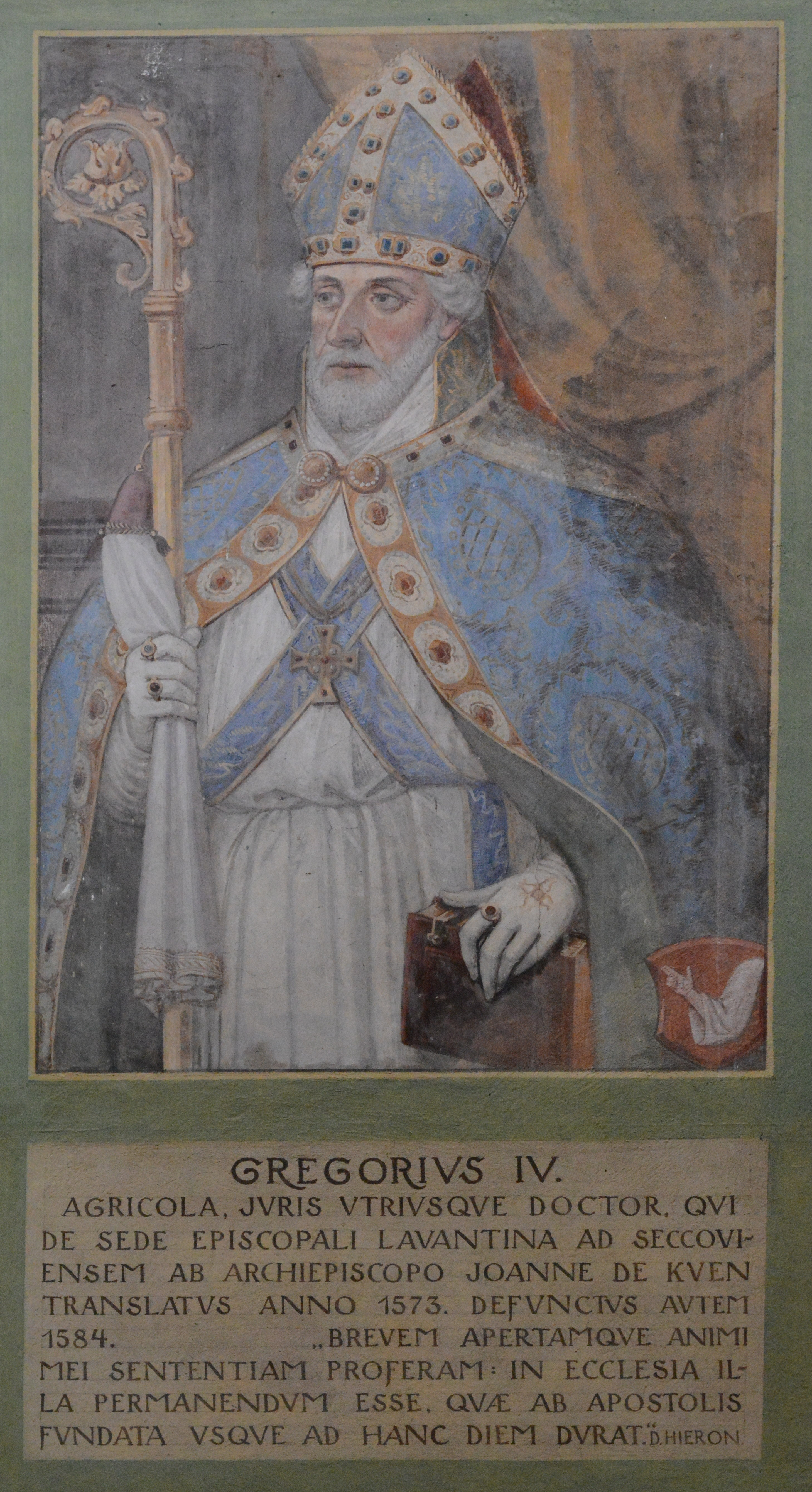 Basilika Seckau, Bischofskapelle, Halbfigurenportrait Bischof Georg IV. Agricola; die Schreibweise "Gregorius IV." sollte lauten "Georgius IV."